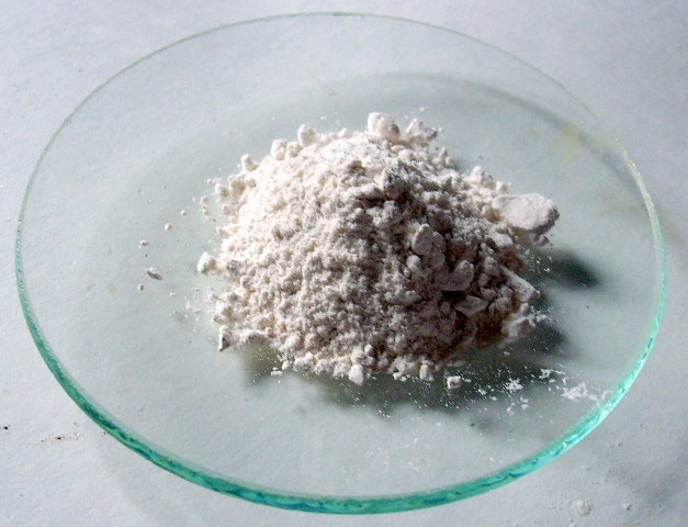 BaO2